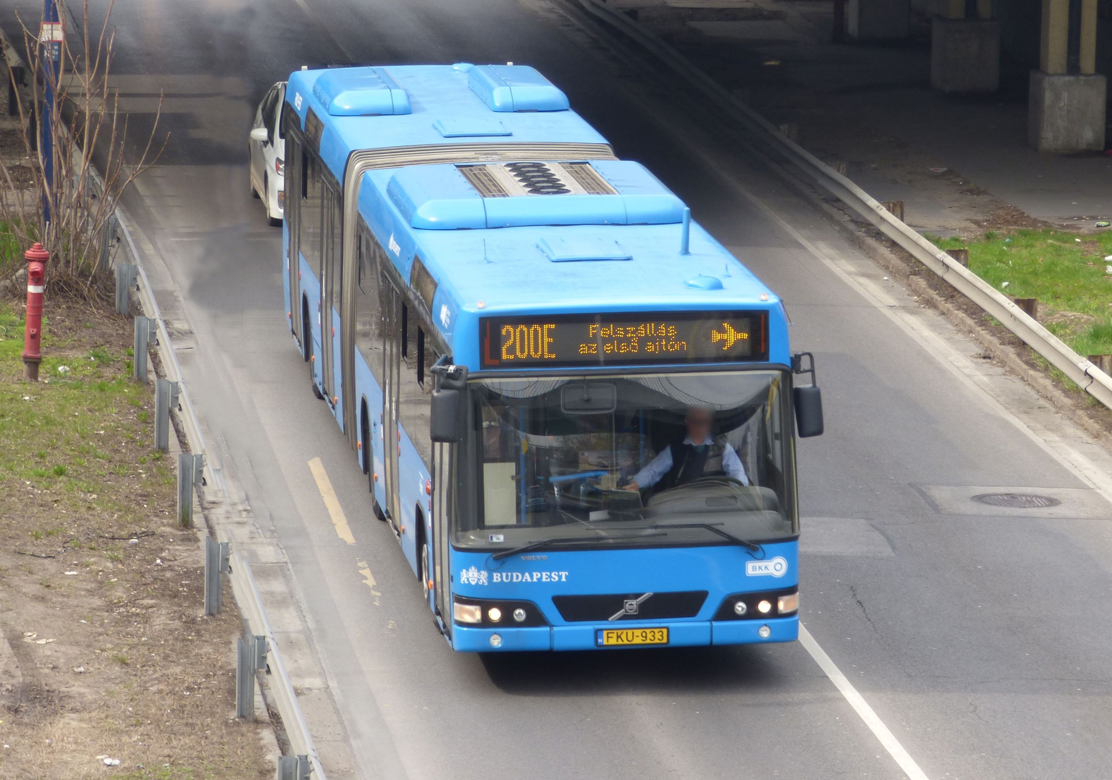 200E jelzésű Volvo 7700A busz a repülőtéri gyorsforgalmi úton